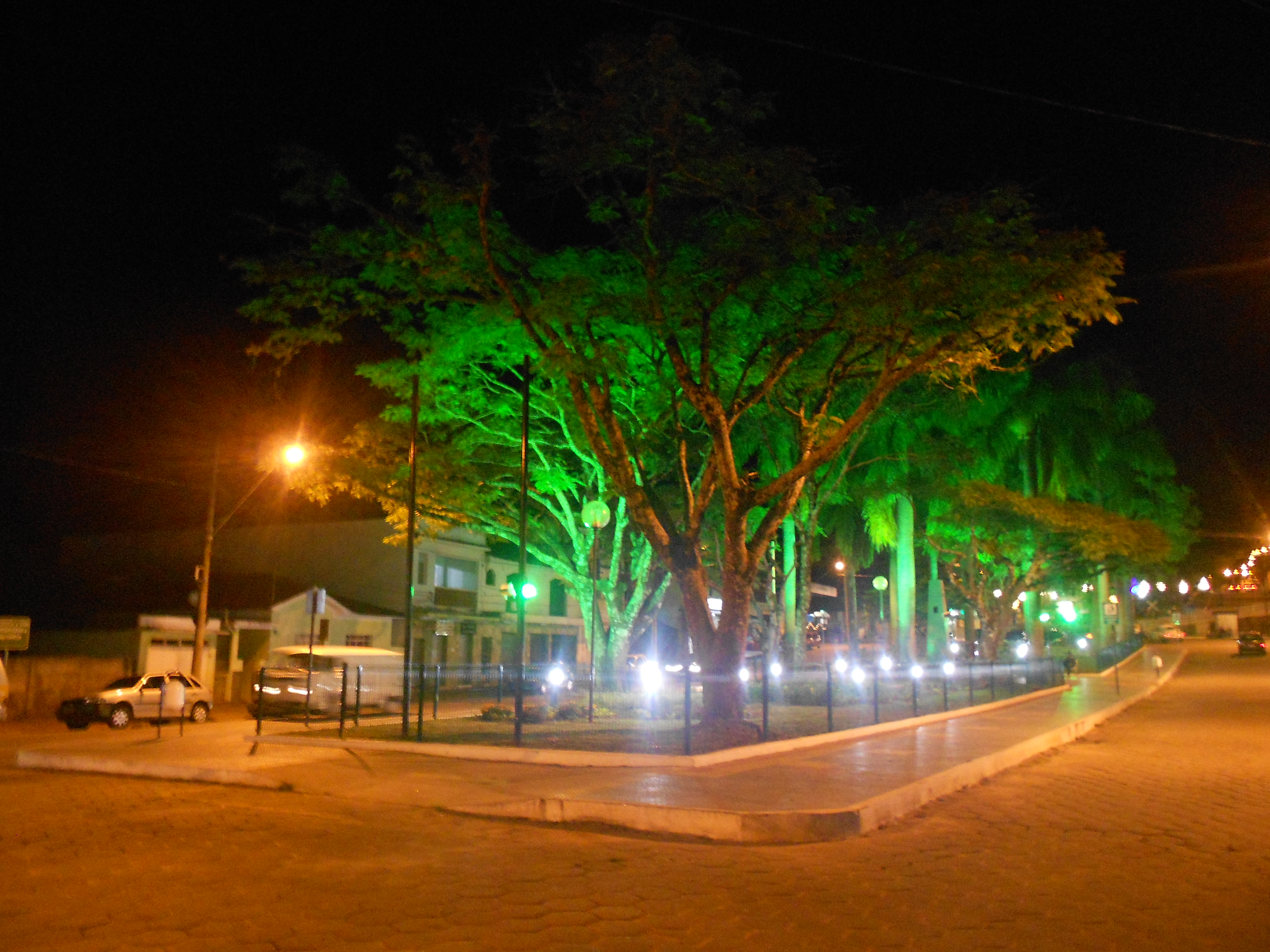 Praça Gabriel Ribeiro Salgado à noite, Centro de Andrelândia, Minas Gerais, Brasil.